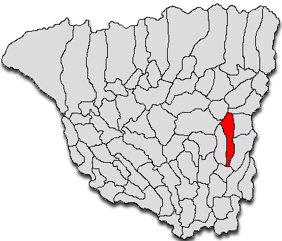 Categorie:Hărţi ale judeţului Gorj